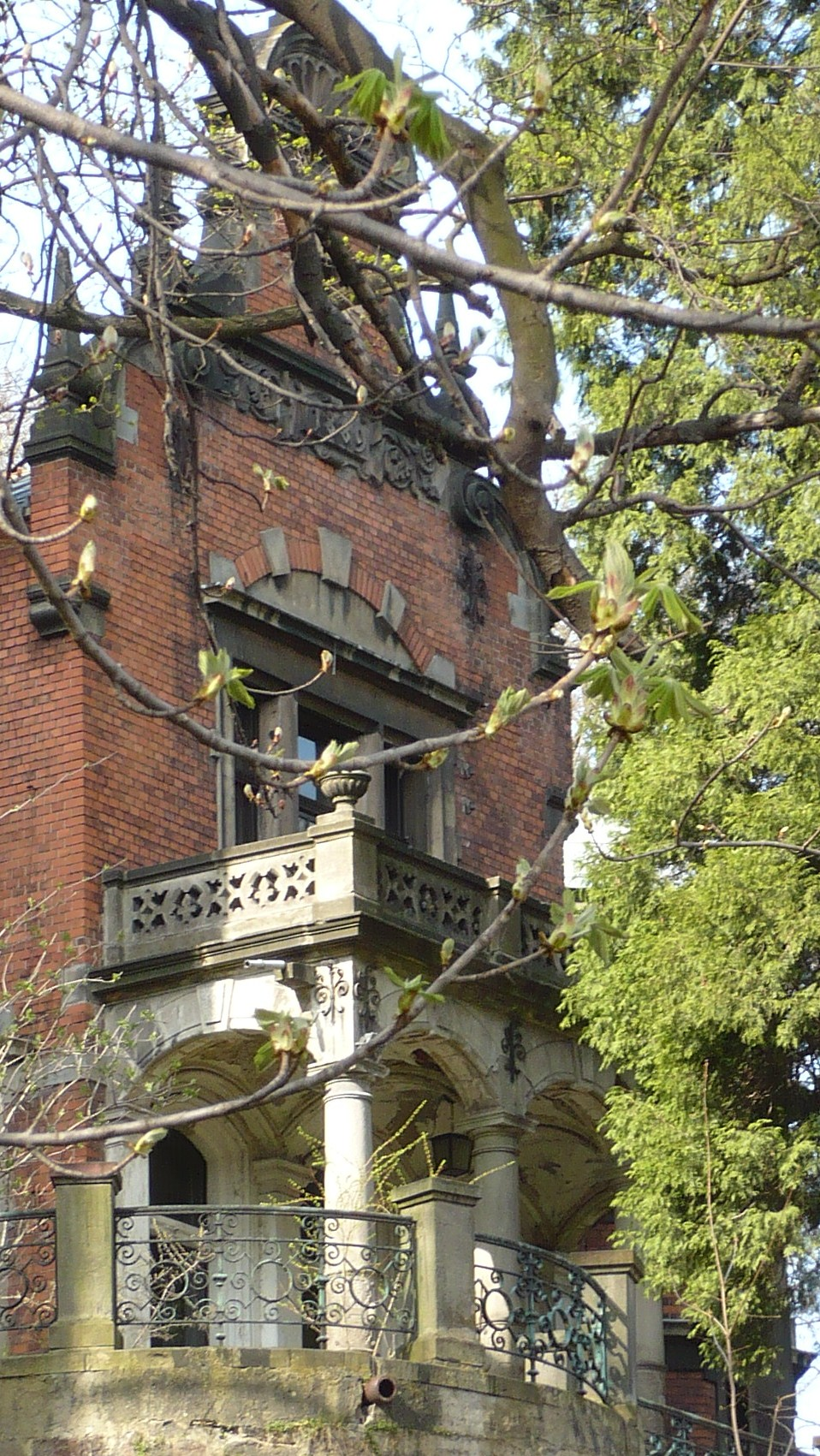 Nowa Ruda, ul. Piłsudskiego 20 - willa „Konrad”, 1890 (zabytek nr A/936/972/WŁ z 8.12.1983)